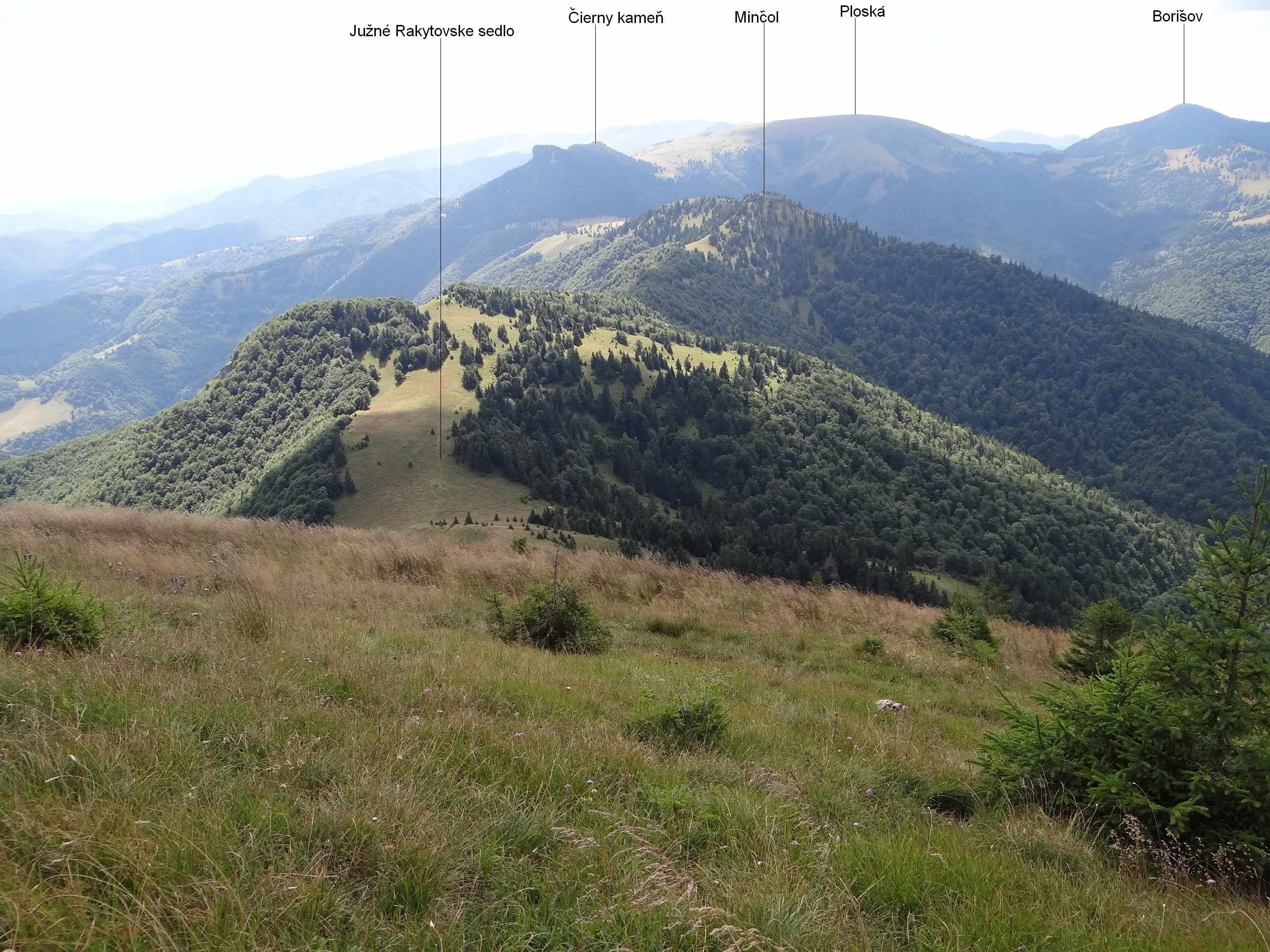 View from Rakytov